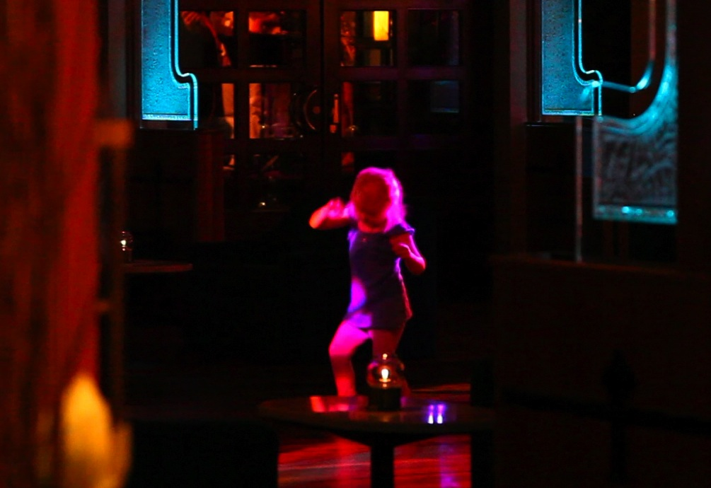 Silent minutes - Olivier Zabat 2013